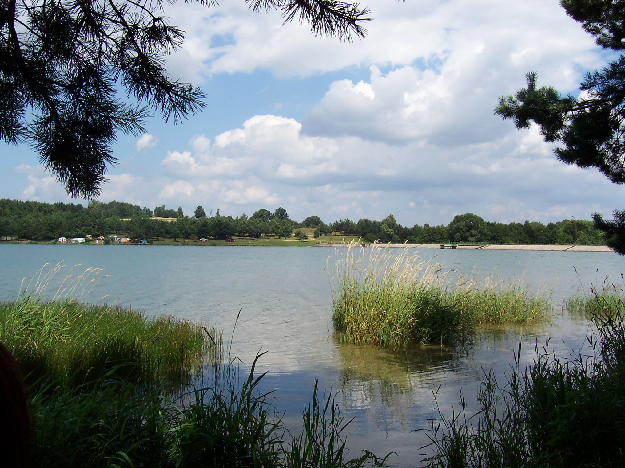 Zalew Kostkowicki